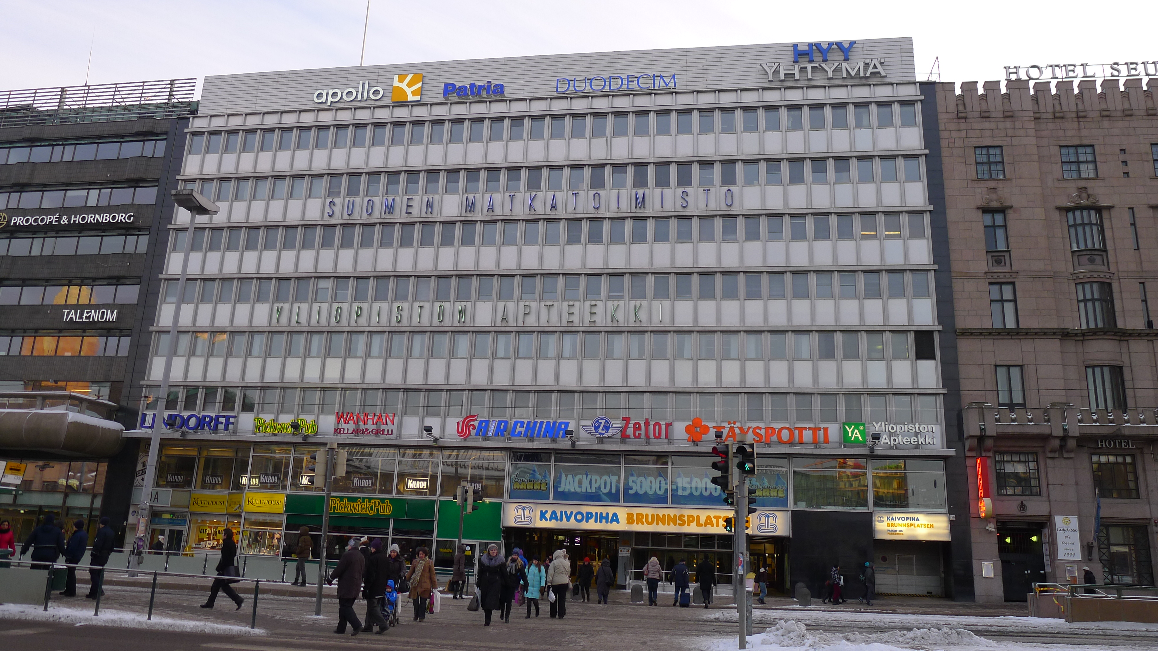 Kaivotalo, Helsinki